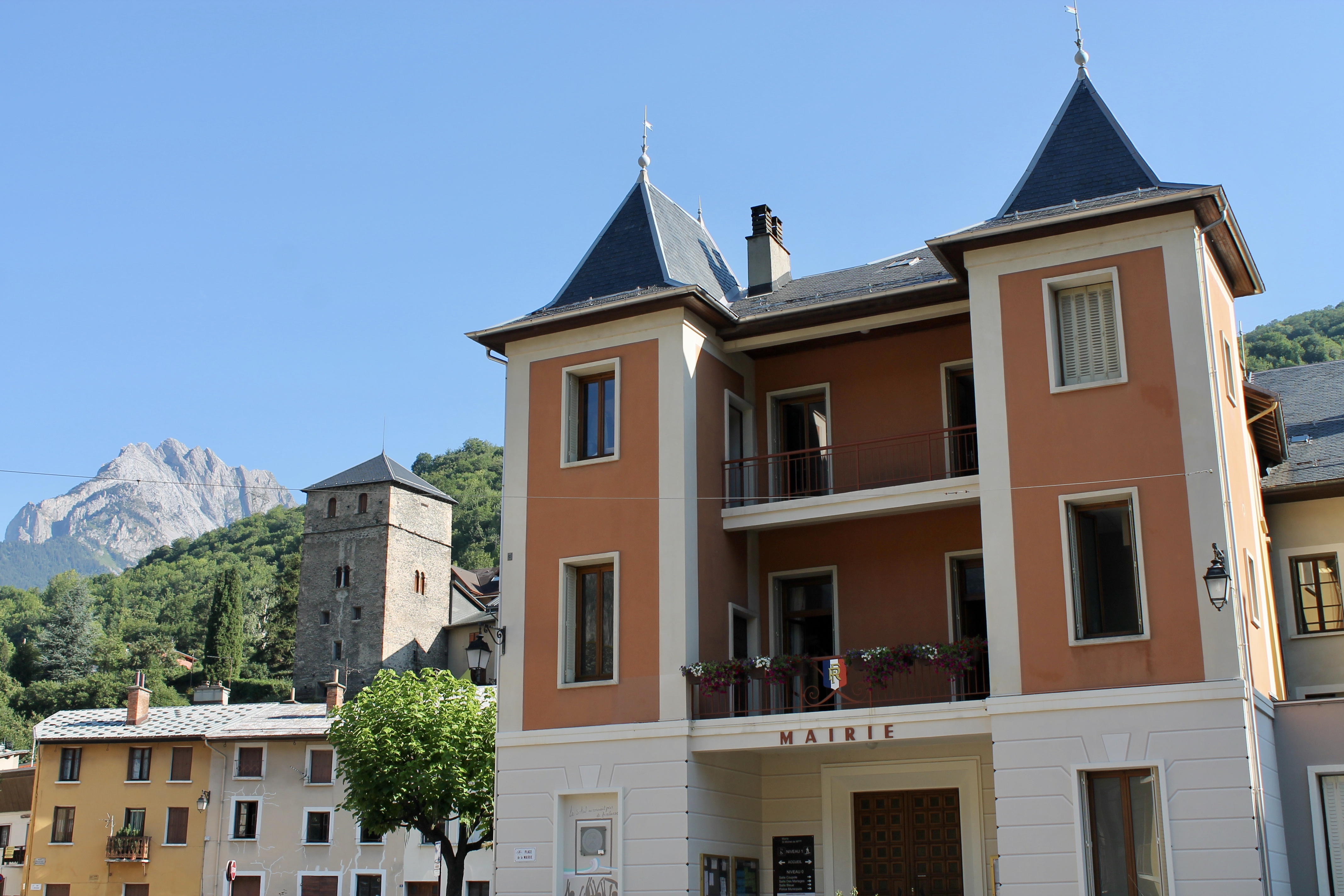 Hôtel de Ville de Saint-Michel-de-Maurienne (août 2018).